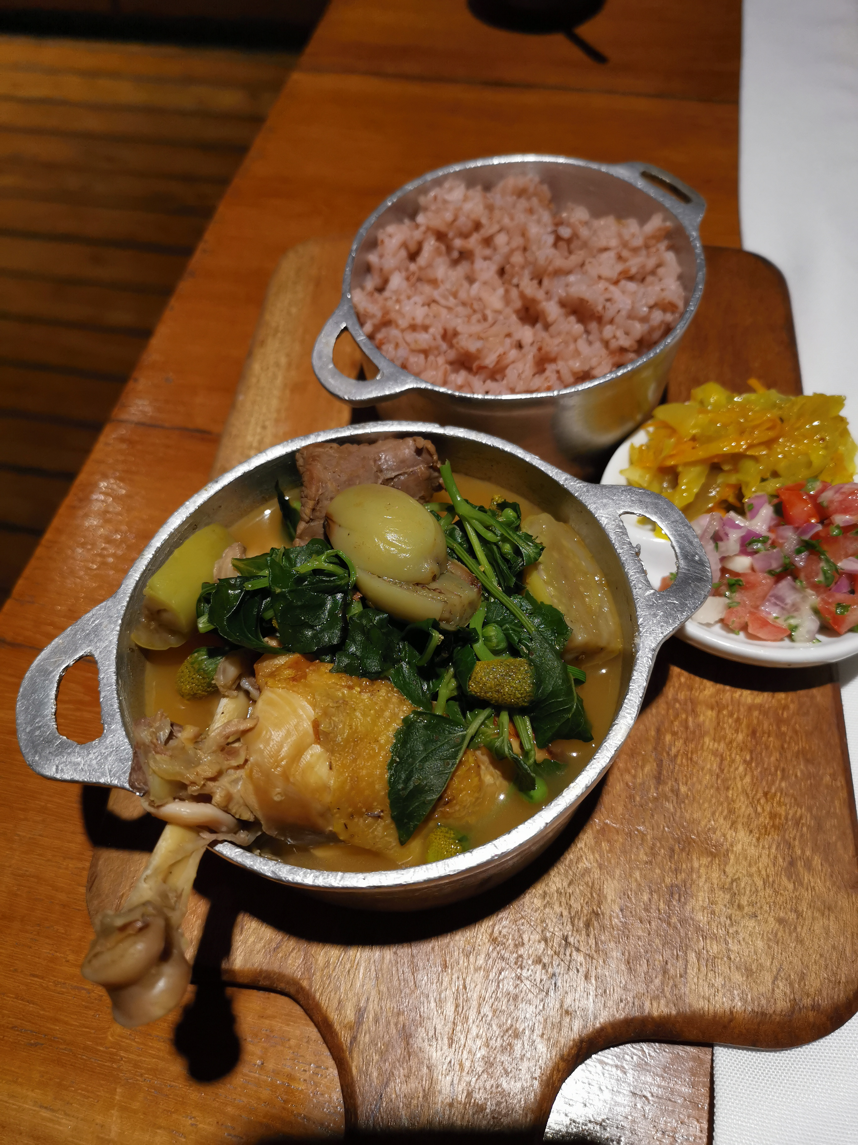 Romanzawa - Madagaskar Stew mit Hühnchen und Rind, grünen Auberginen und als Gewürz Jambu (Acmella oleracea) dazu roter Reis